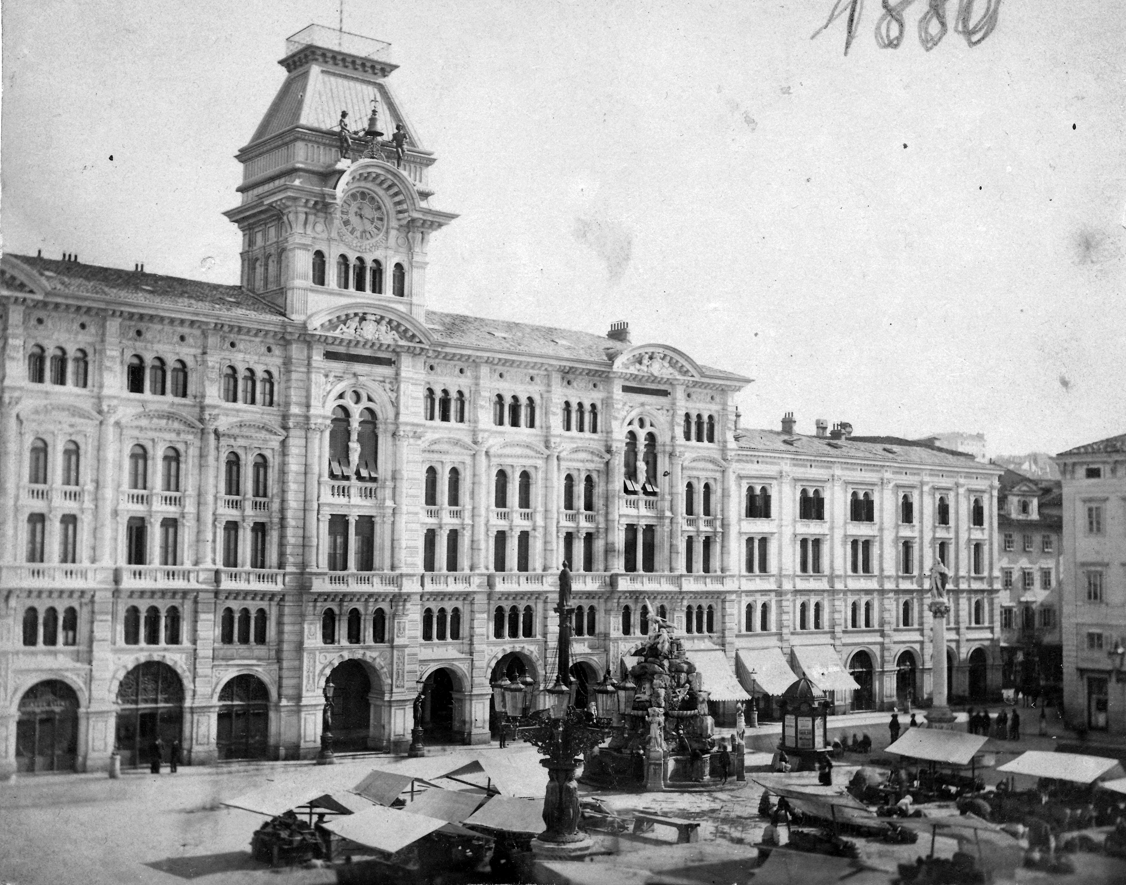 Piazza dell'Unita d'Italia (Piazza San Pietro), szemben a Városháza (Palazzo Comunale, Palazzo di Municipio). A felvétel 1880-ban készült. Location: Italy, Trieste Tags: public building, square, street view, monument, market Title: Piazza dell'Unita d'Italia (Piazza San Pietro), szemben a Városháza (Palazzo Comunale, Palazzo di Municipio). A felvétel 1880-ban készült.